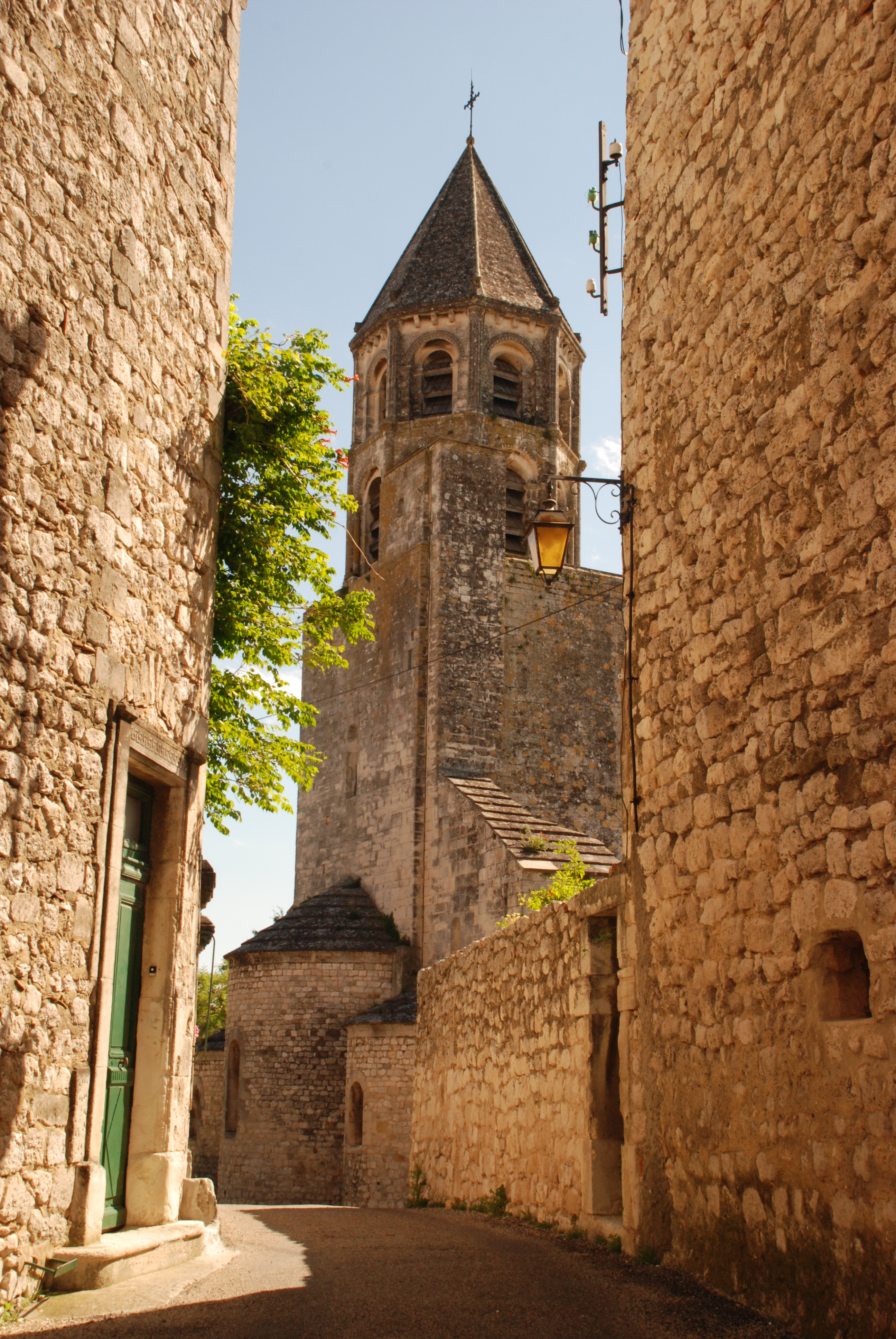 France - Drôme - La Garde-Adhémar